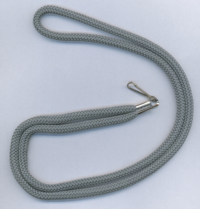 Przykładowy sznur służbowy